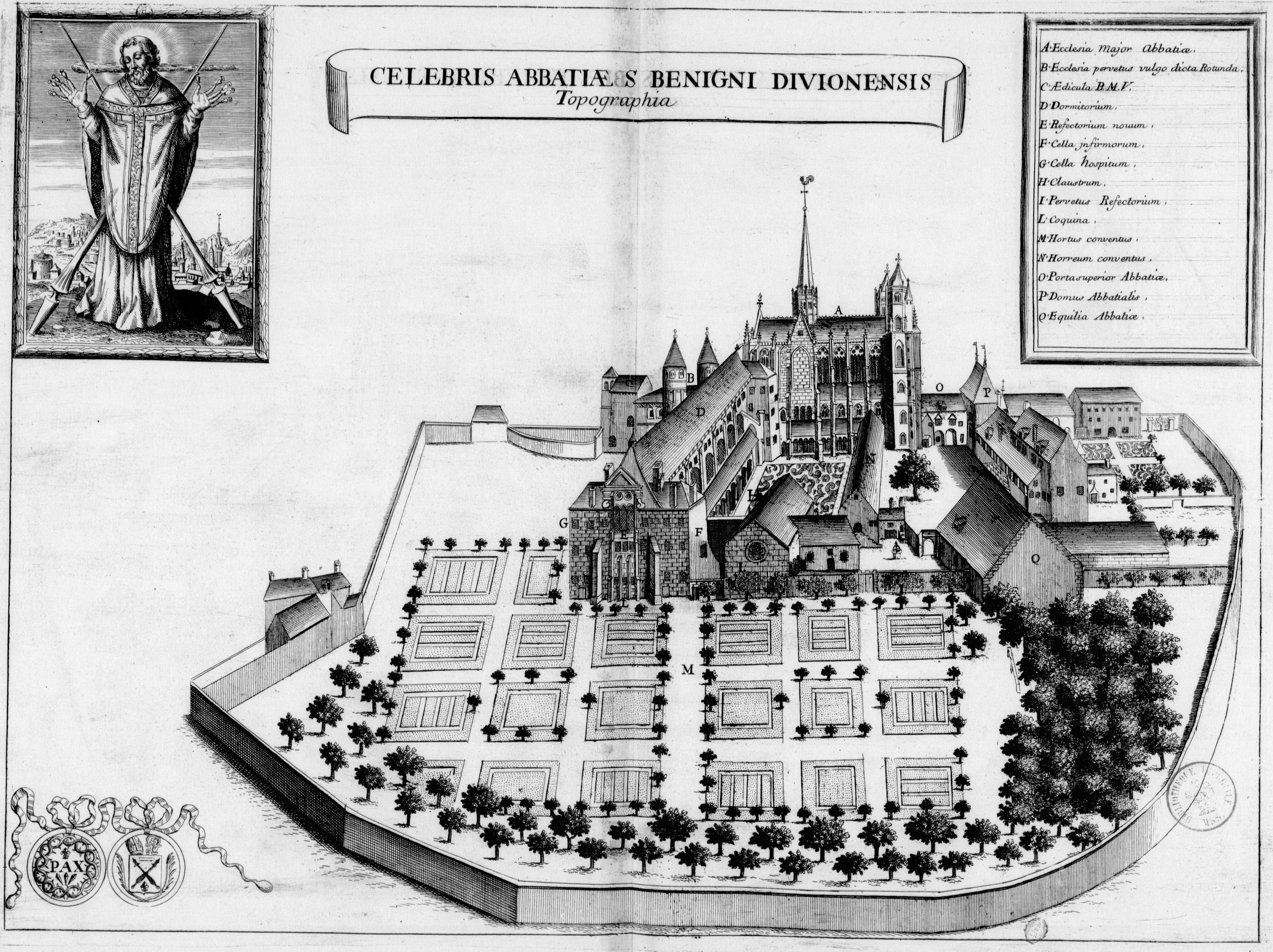 Planche gravée du 17ème siècle représentant l'abbaye Saint-Bénigne de Dijon, en France, dans le livre Monasticon Gallicanum.